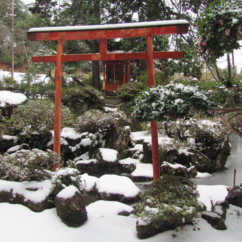 撮影：普賢菩薩